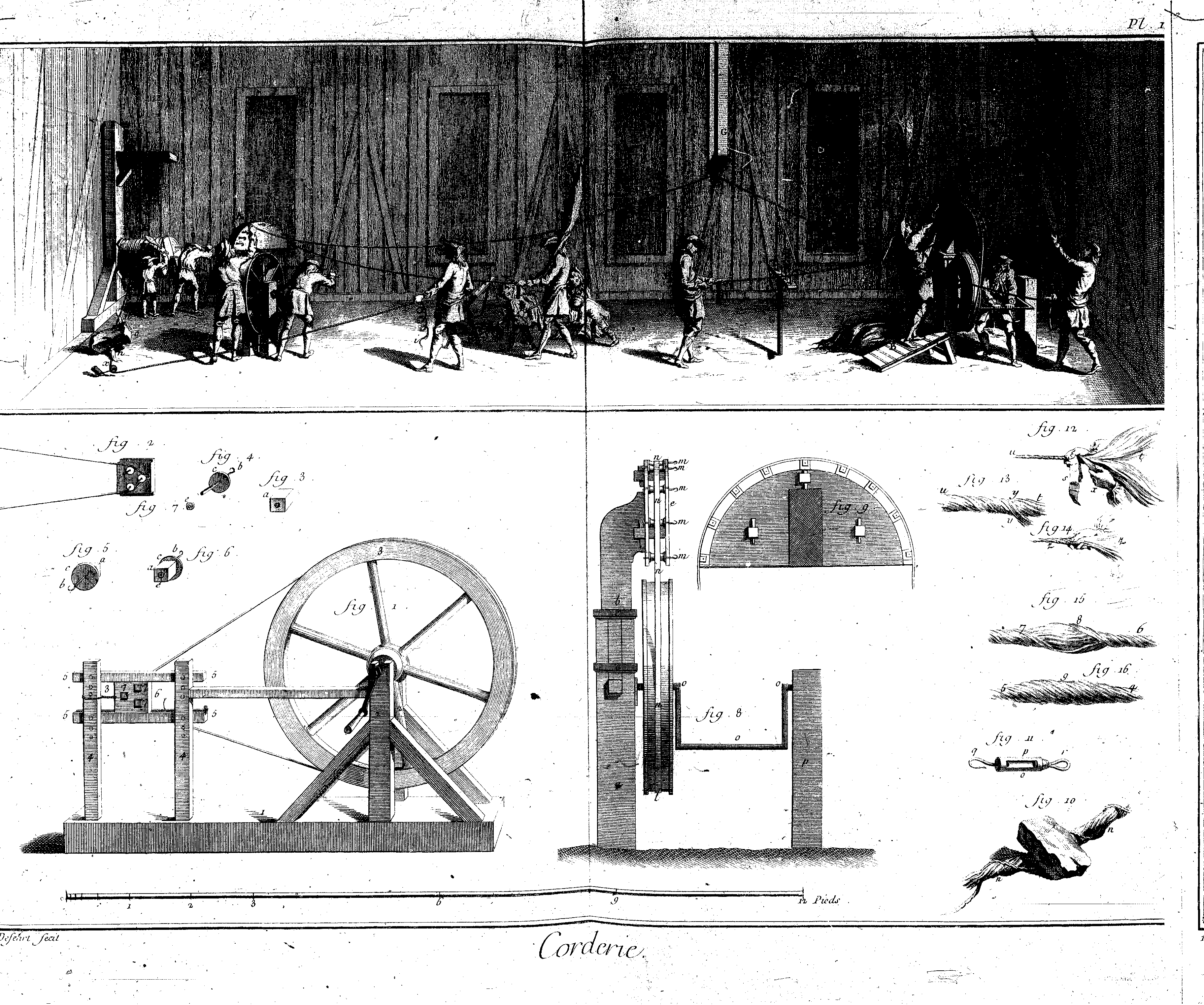 Planches de l'Encyclopédie de Diderot et d'Alembert, volume 2b